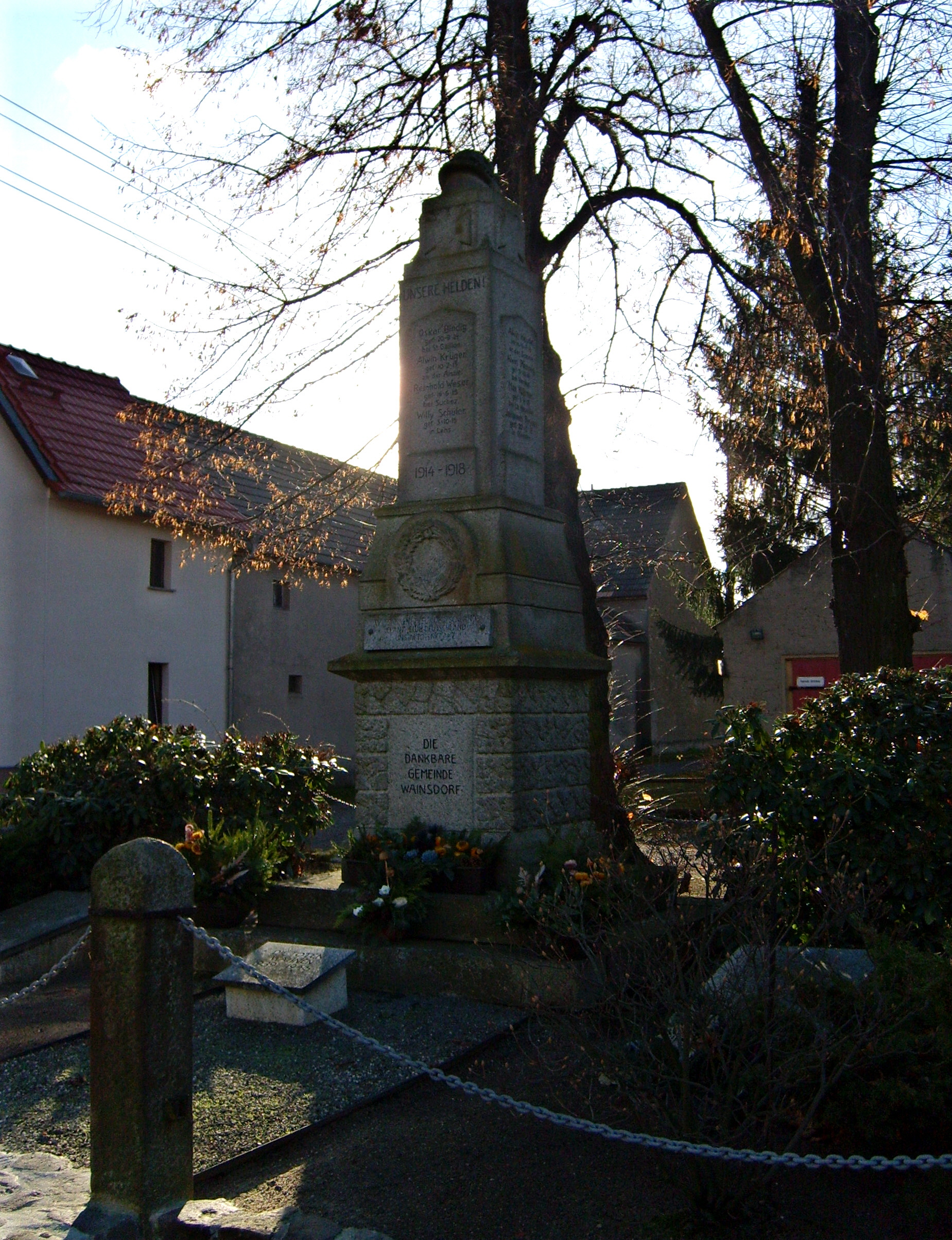 Kriegerdenkmal Wainsdorf